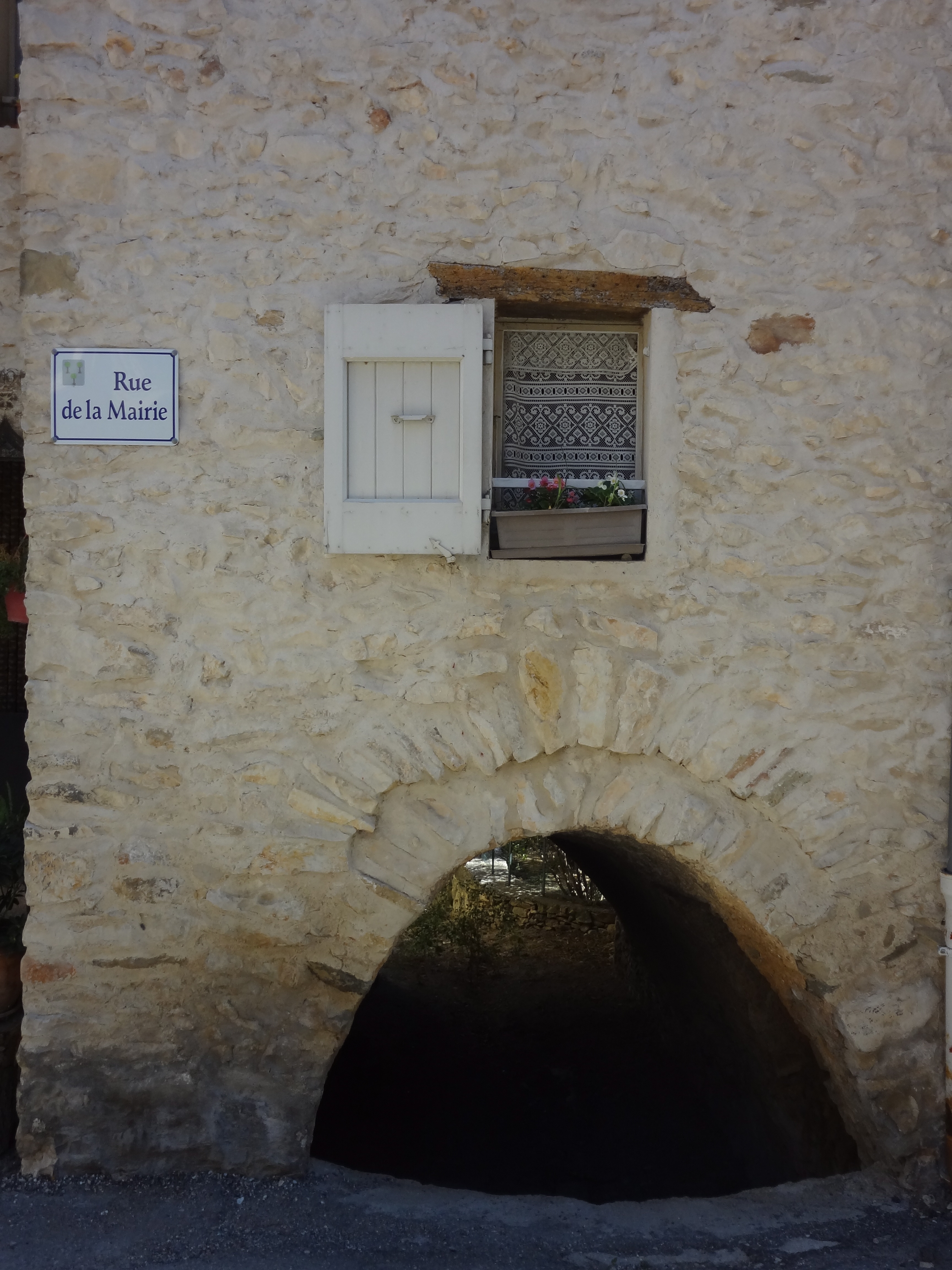 La voûte est l’entrée d’un passage.